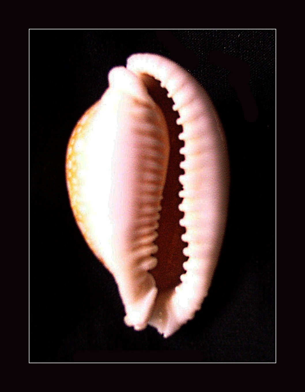 Miliaris Cowry - Erosaria miliaris (synonym : Cypraea miliaris)